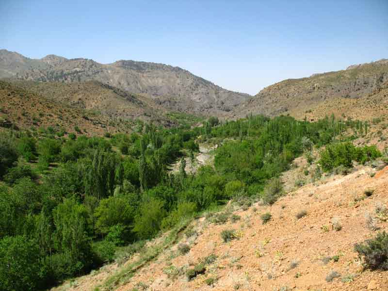 سرمشک